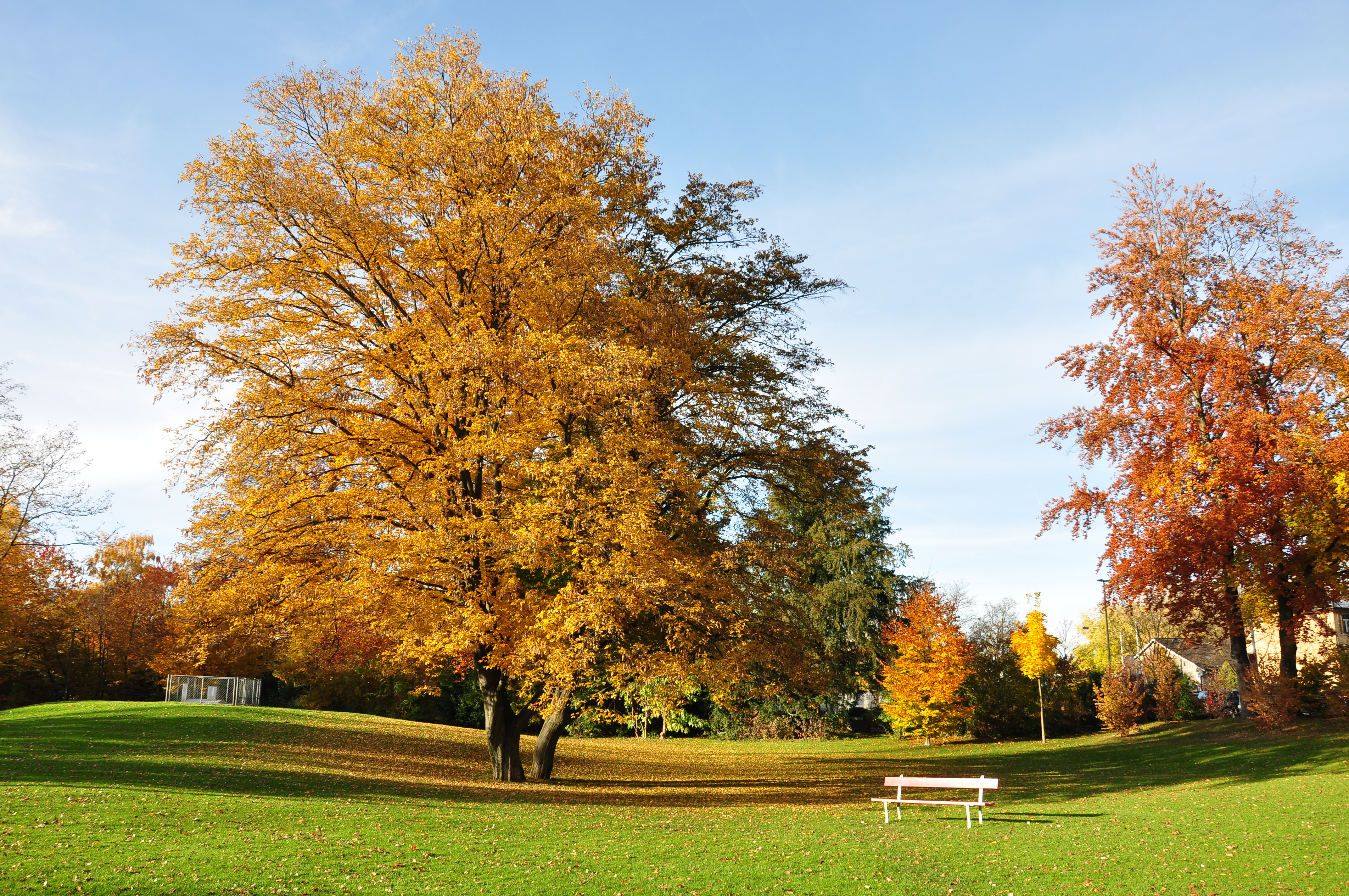 Carpinus betulus, Zürichhorn in Zürich-Seefeld (Switzerland)